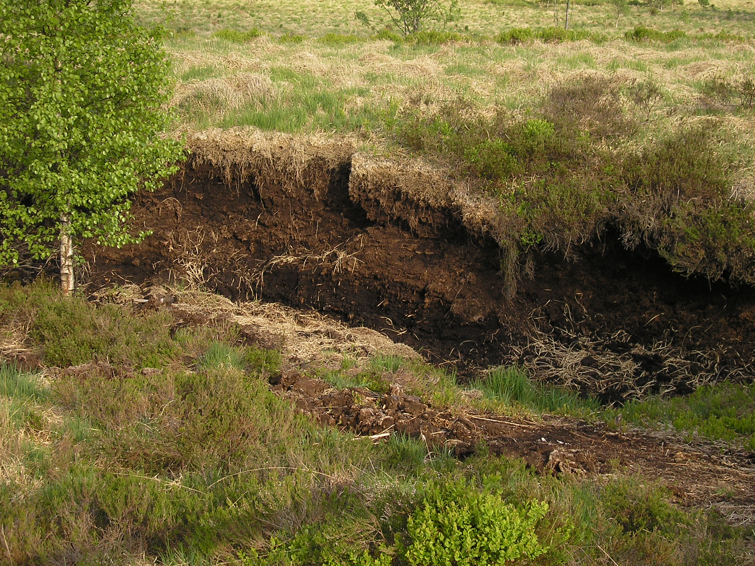 Polleurvenn, Torfstich, Waimes, Ost-Belgien